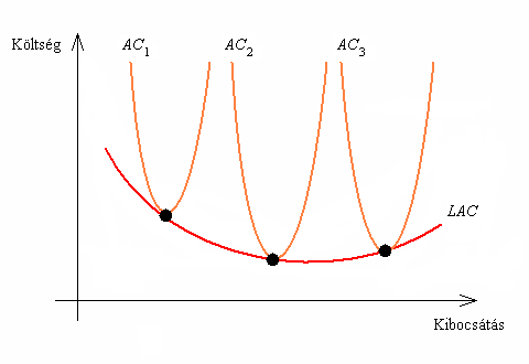 Rövid- és hosszú- távú átlagköltségfüggvények